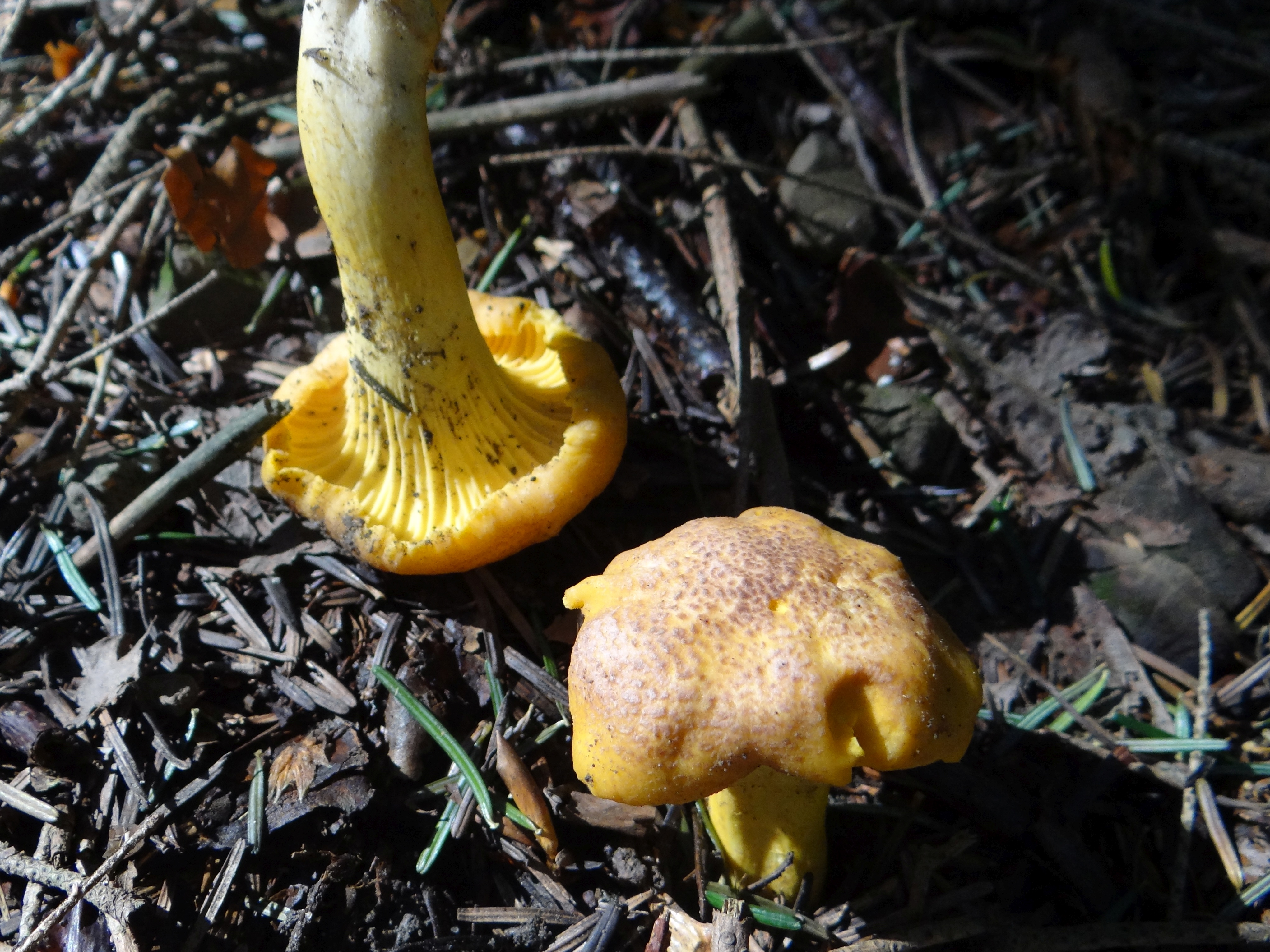 Cantharellus amethysteus. Location: Poland, Kamionna (województwo małopolskie)